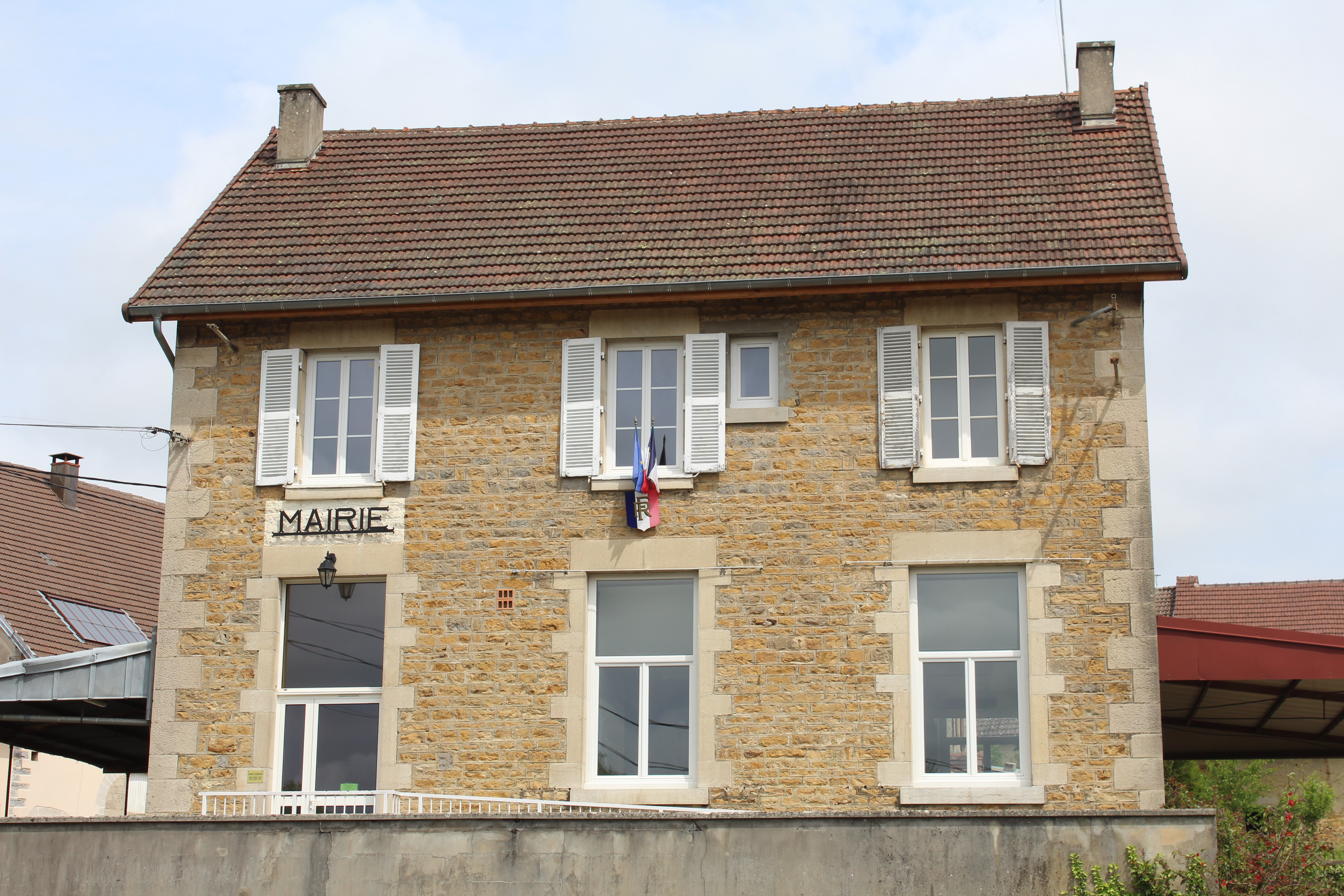 Mairie du Louverot.